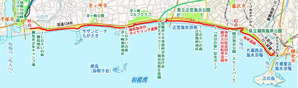 湘南海岸・砂浜のみち解説マップ